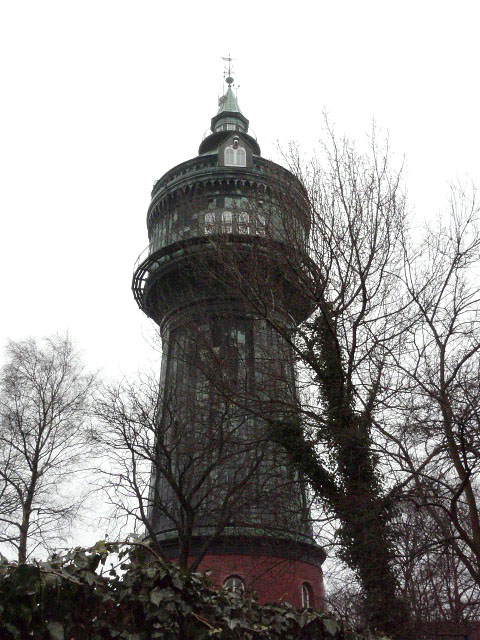 Wasserturm im Hamburger Stadtteil Lokstedt